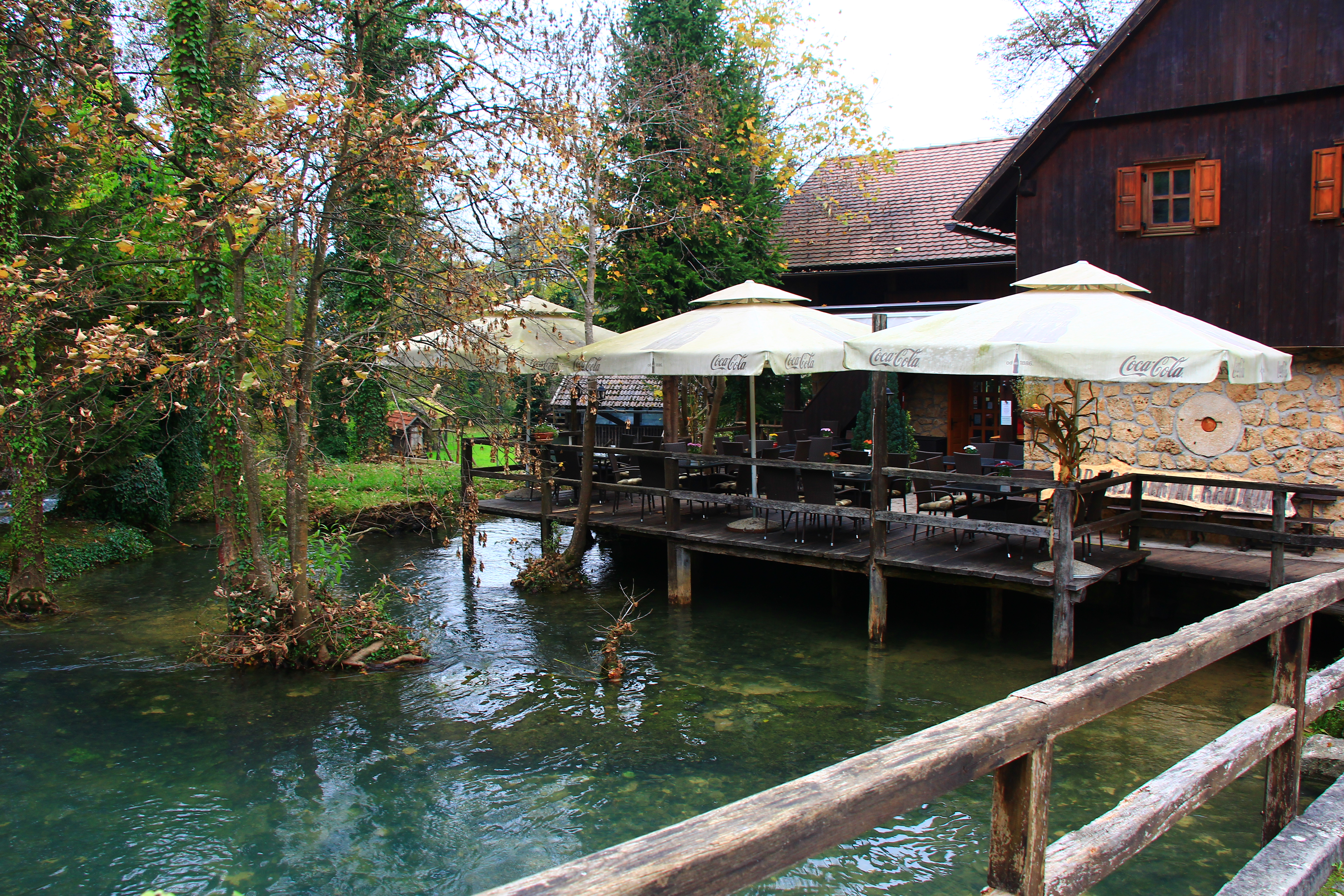 Rastoke mit seinen Wasserfälllen, Teil der Stadt Slunj in Kroatien